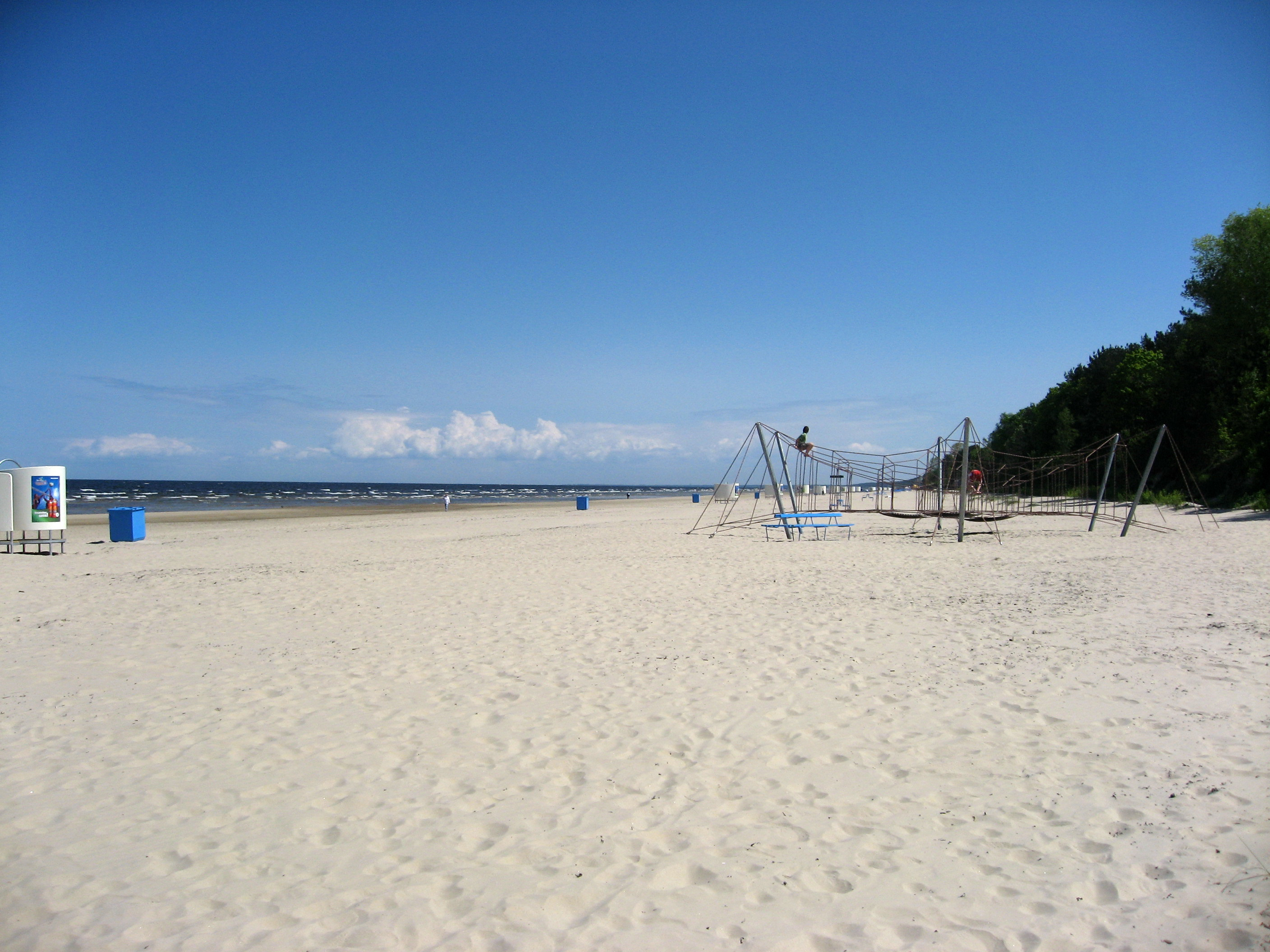 Jūrmala, pláž a moře